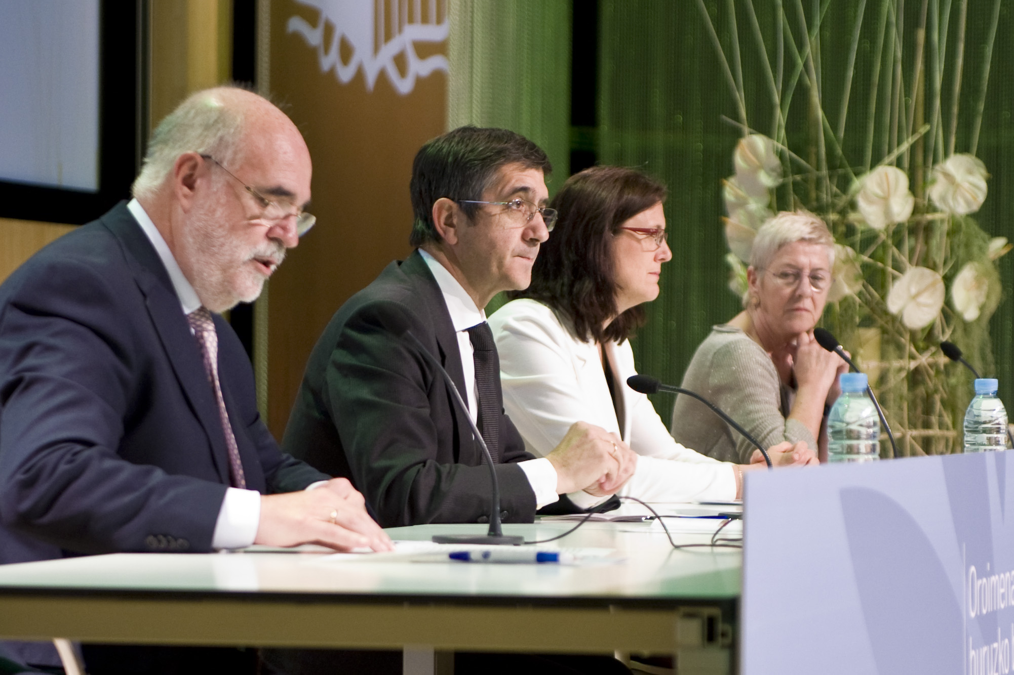 Oroimen eta bizikidetza biltzarra. Irekiera, Patxi Lopez lehendakariarekin.